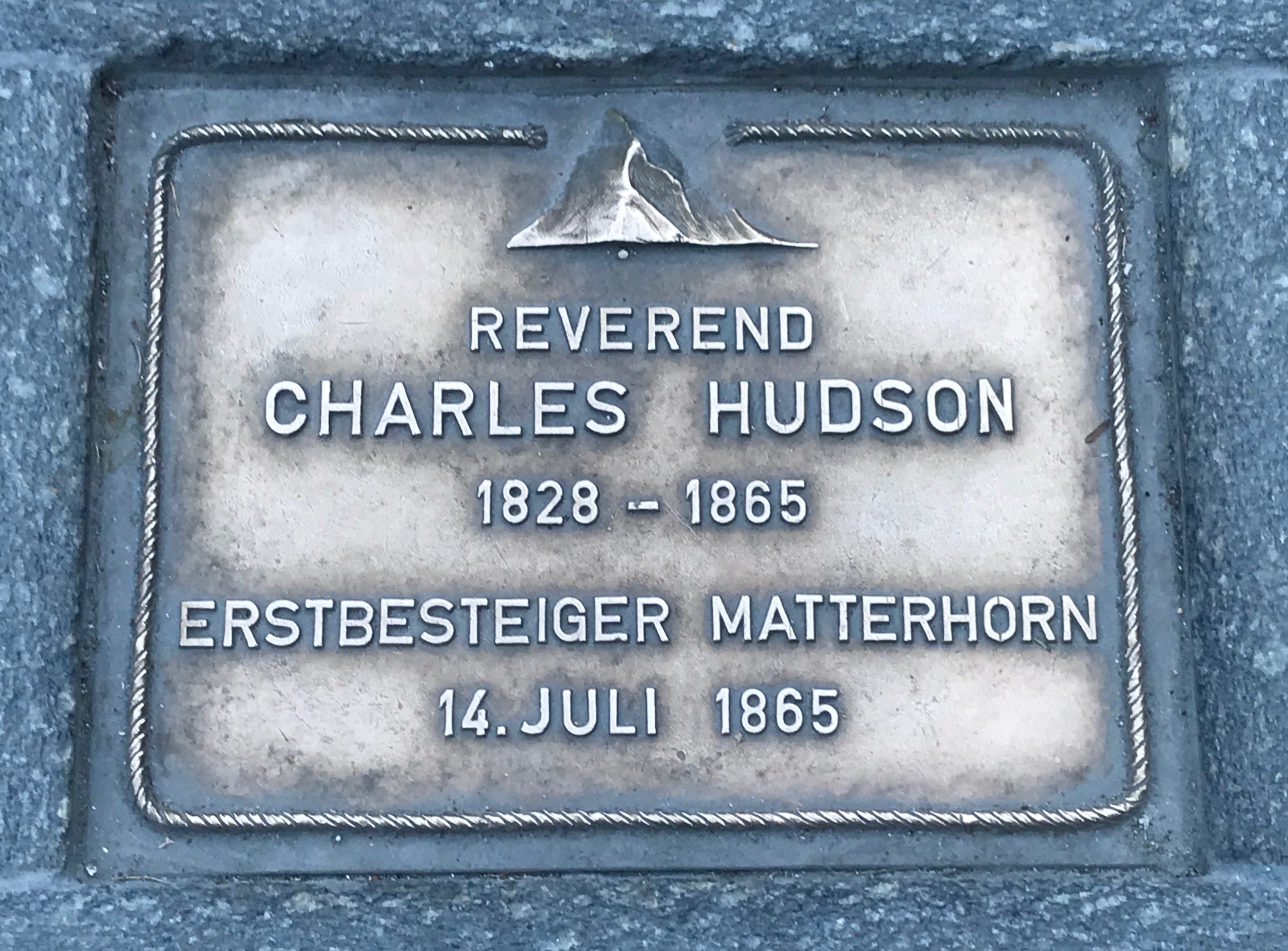 Gedenktafel in Zermatt